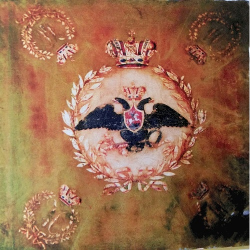 Пожалованное коннице Кенгерли почётное знамя, на зелёном полотнище которого изображён Государственный герб и вензель Николая